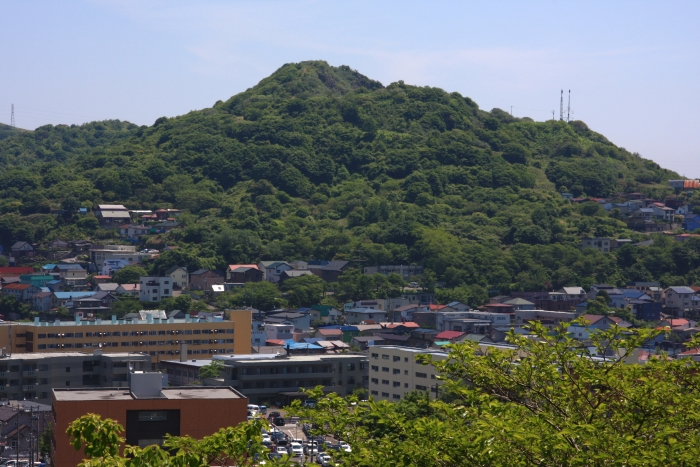 母恋富士（室蘭）